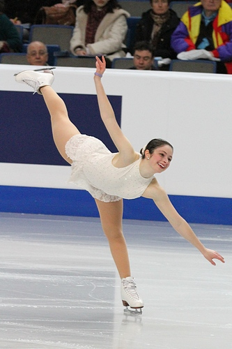 Челси Роза Чиаппа (Венгрия) на чемпионате Европы 2012 года.